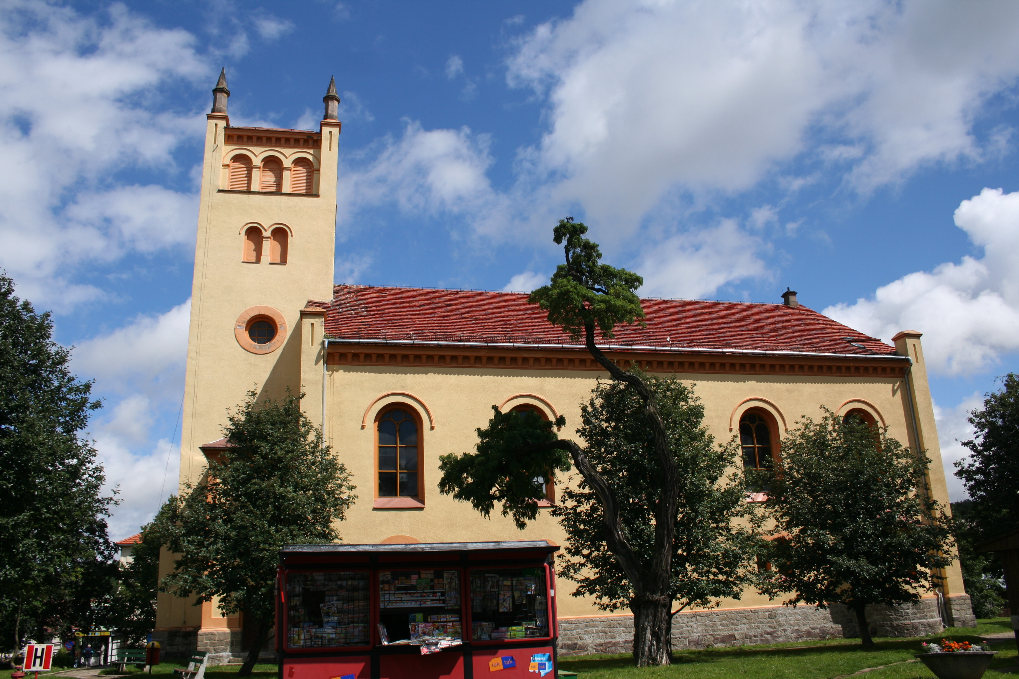 Bolków, ul. Niepodległości 10 - dawny kościół ewangelicki, obecnie sala gimnastyczna Zespołu Szkół Agrobiznesu, 1855